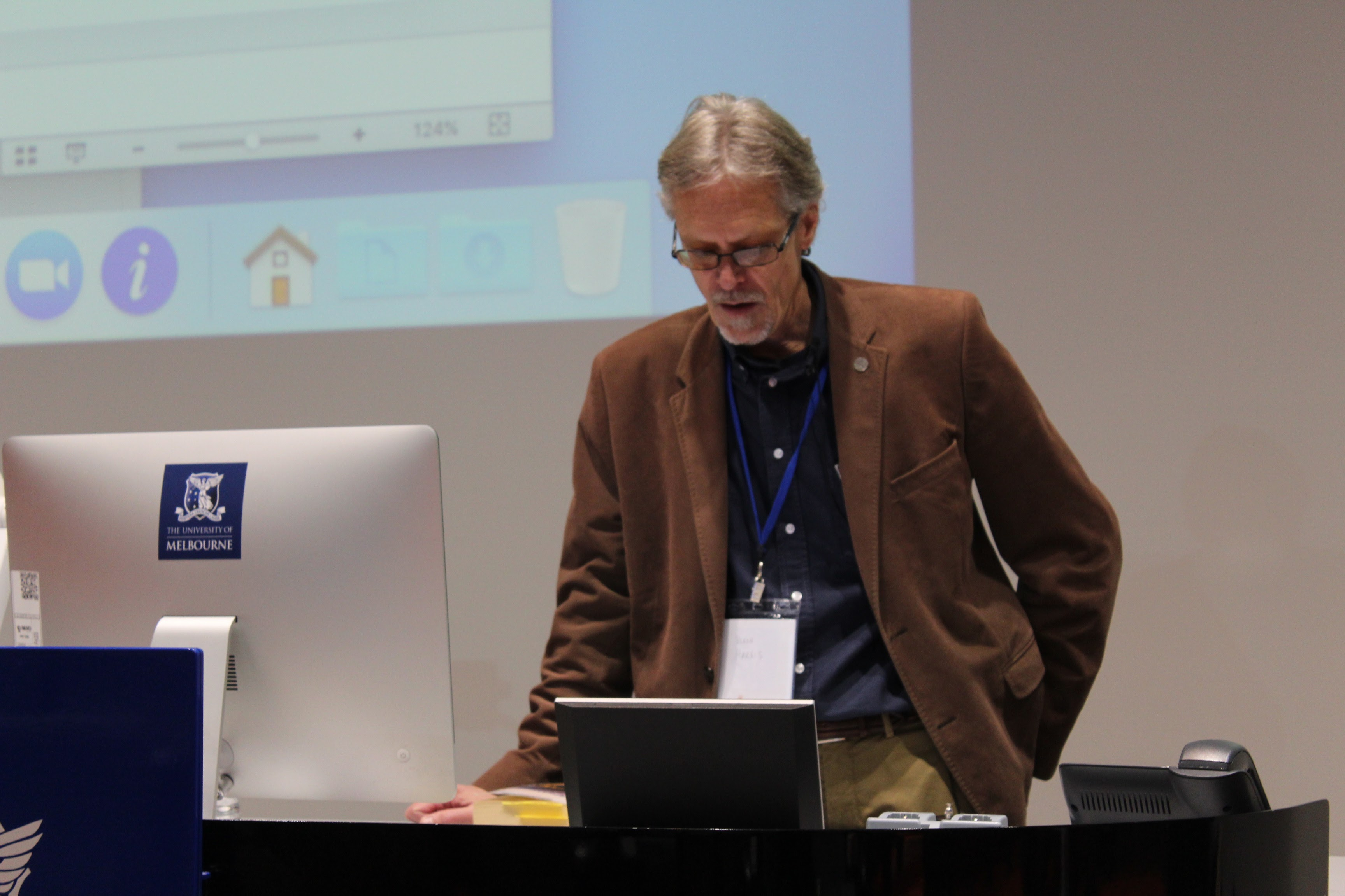 Opening keynote from Verne Harris